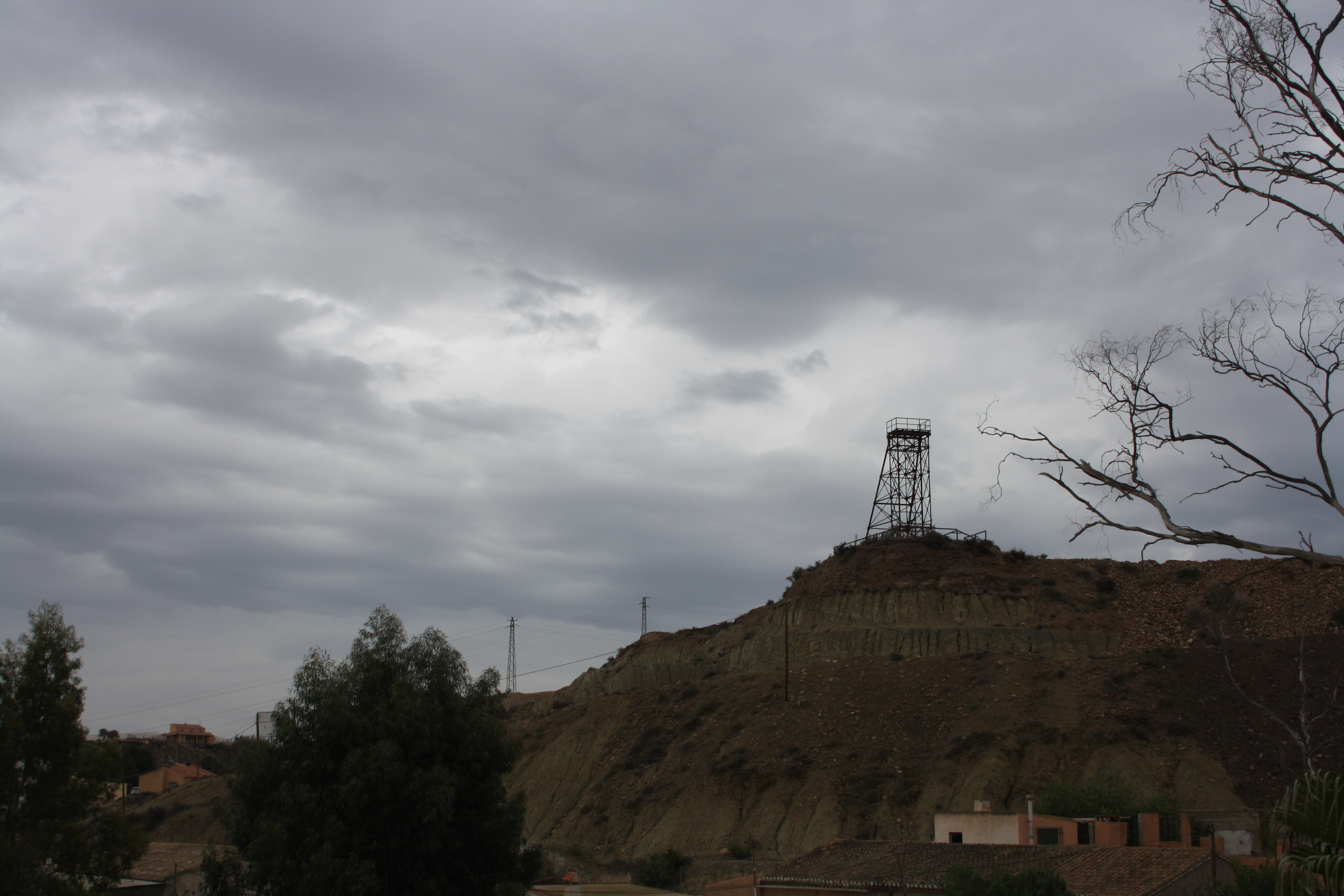 Vista de la Mina de la Alianza desde el pueblo de Las Herrerías, en el municipio de Cuevas del Almanzora, provincia de Almería (España).